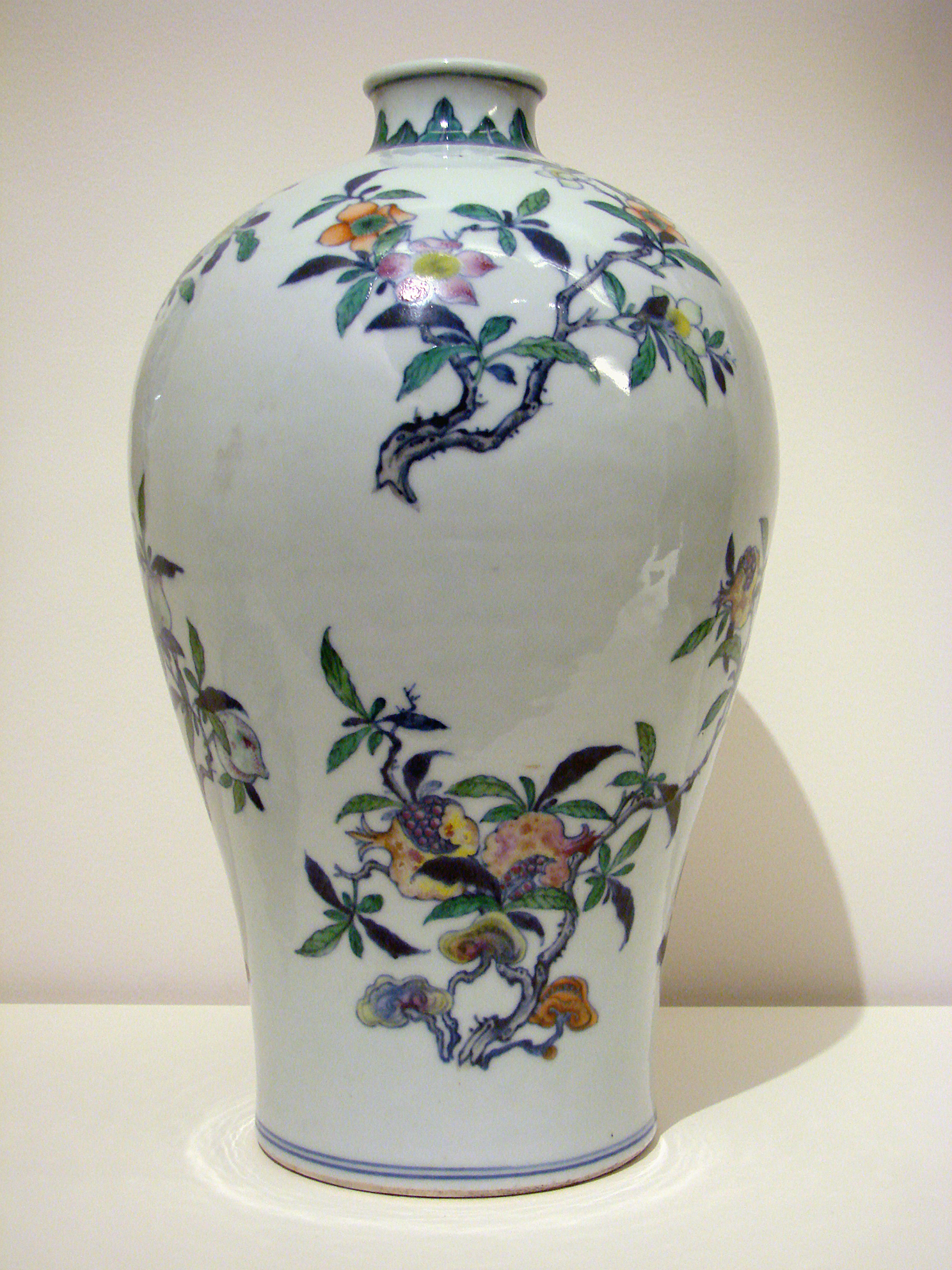 Vase meiping à décor de branches fleuries. Chine, 18ème siècle. Musée Guimet, Paris, Inventory number G 556